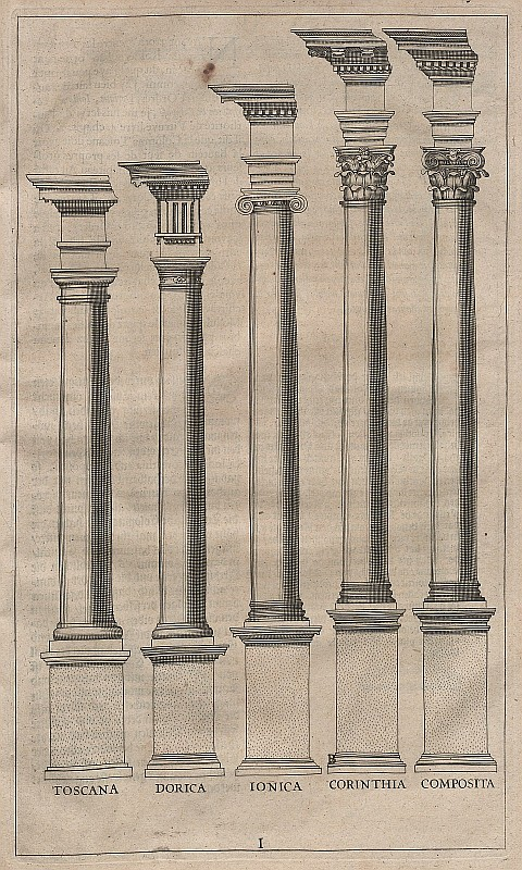 Original image description from the Deutsche FotothekArchitektur & Säule & Ordnung